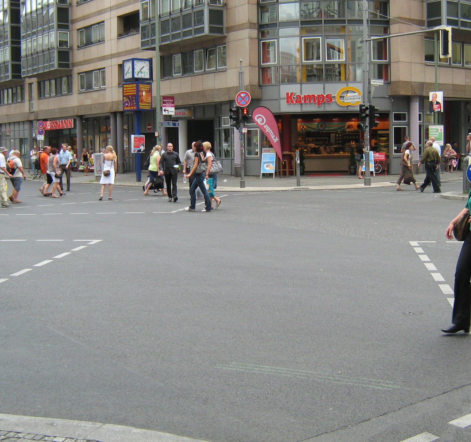 Amerikanische Kreuzung „Friedrichstraße/Rudi-Dutschke-Straße“ in Berlin 2009